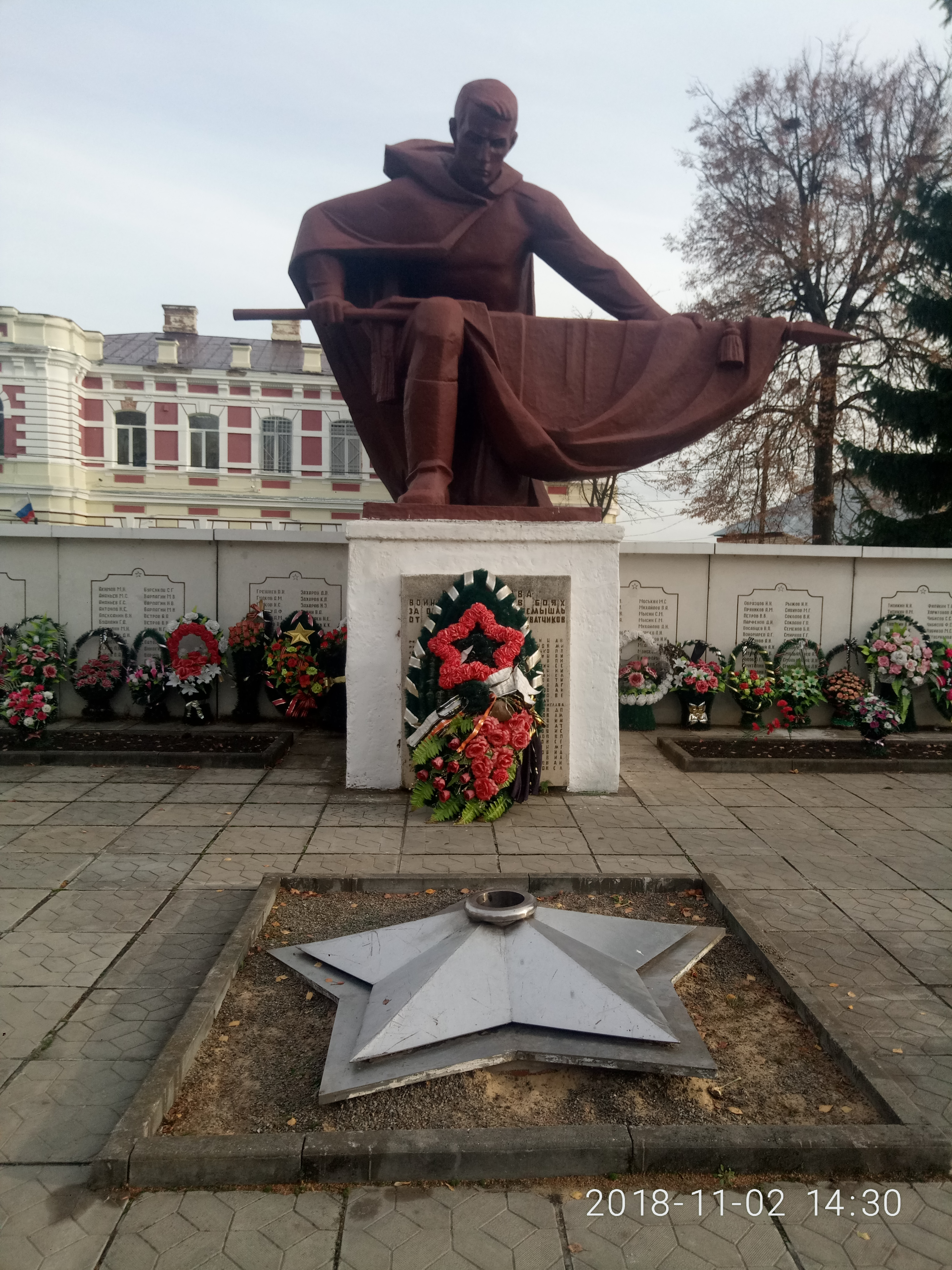 Мемориальный комплекс расположен в центре с. Перемышль, на Аллее Славы